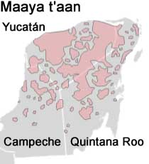 Heutige Verbreitung des Mayathan (der yukatekischen Maya-Sprache) in Mexico. Erstellt auf Grundlage der entsprechenden Karte im Artikel Lenguas de México.